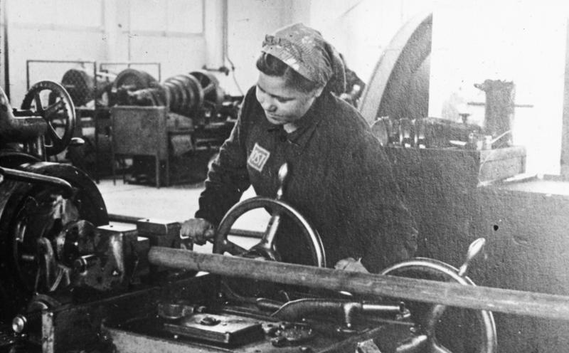 25 Ukrainerin Drehbank